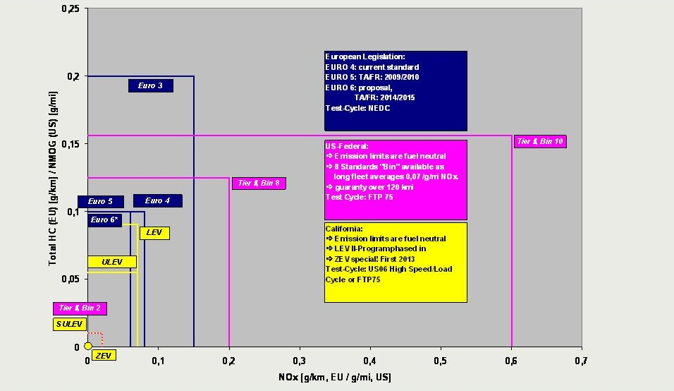 Zeigt eine vergleichende Gegenüberstellung europäischer und amerikanischer Limitierungen von Kohlenwasserstoffen (HC) bzw. NMOG (Non-Methan-Organic Gases) über Stickoxiden (NOx). Für Europa: Fzg. mit Ottomotoren. Für Amerika: keine Unterscheidung zw. Otto- und Dieselmotoren